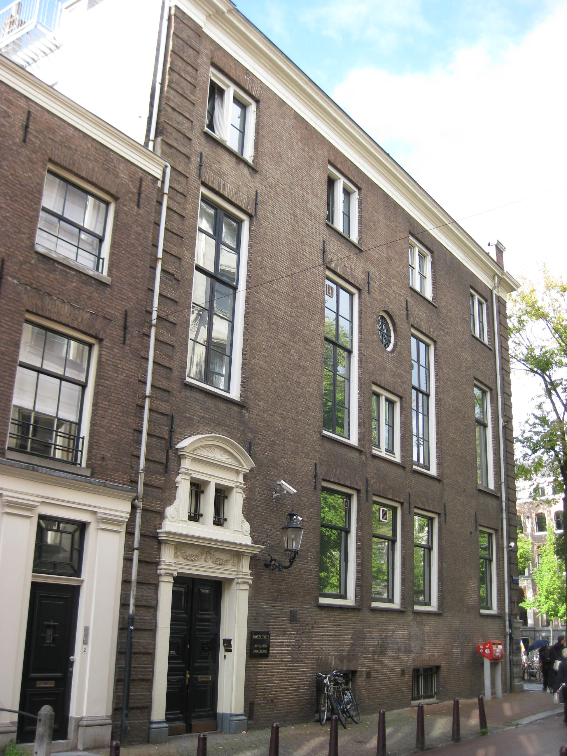 Het kantoor van Bram Moszkowicz in Amsterdam gezien vanaf de Nieuwe Spiegelstraat